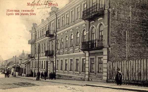 Вуліца Праабражэнская (Валадарскага і далей Інтэрнацыянальная). Жаночая гімназія. Паштоўка пачатку ХХ-га стагоддзя.